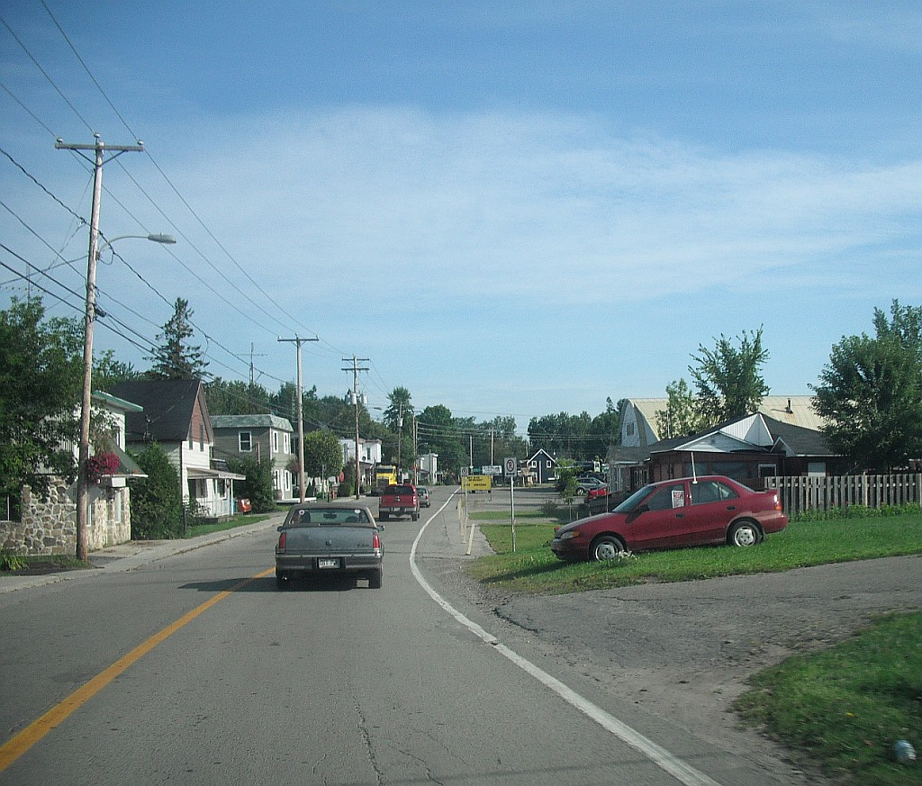 Vue du village de Saint-André-D'Argenteuil, dans les basses Laurentides, au Québec.